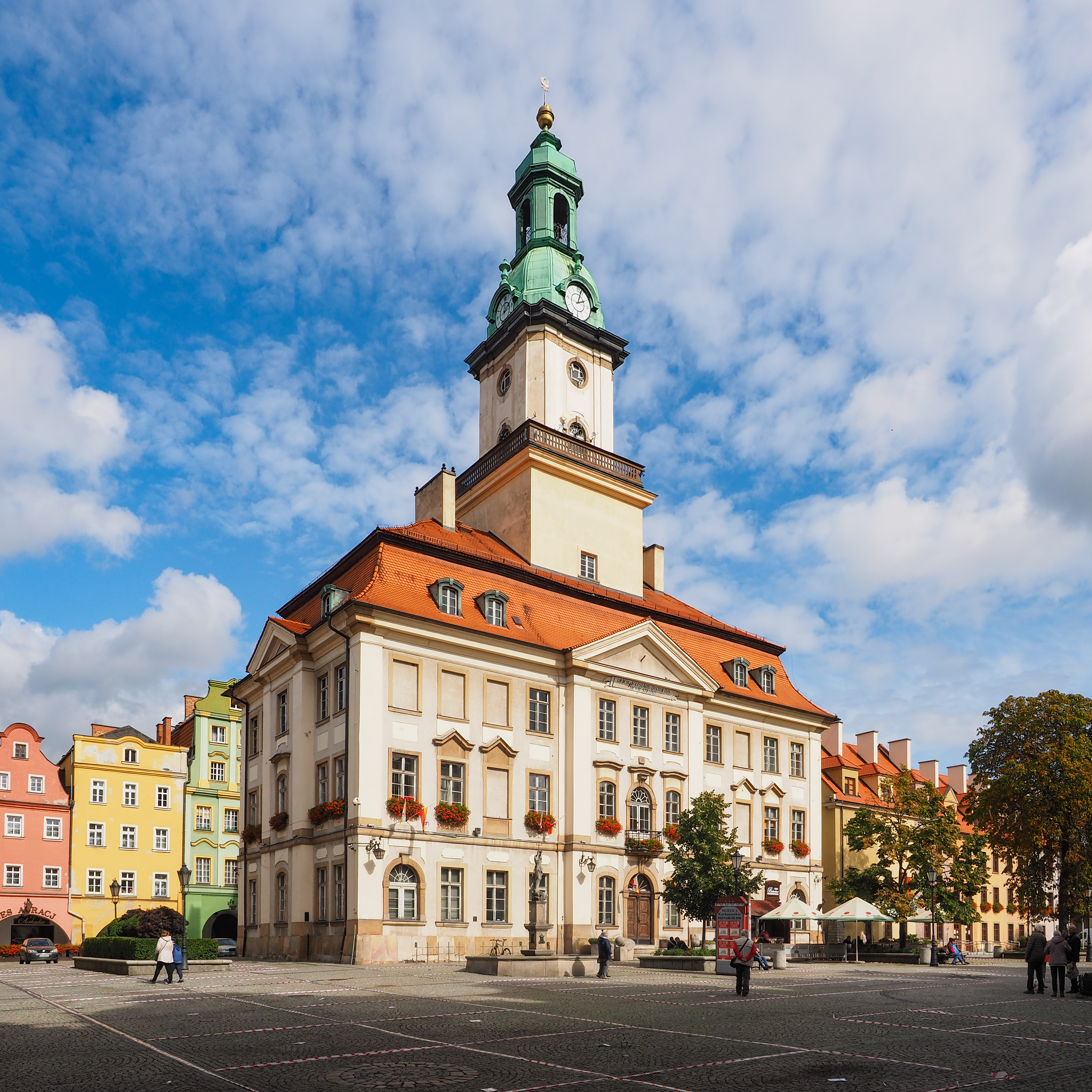 Jelenia Góra, Plac Ratuszowy - ratusz, 1744-1749